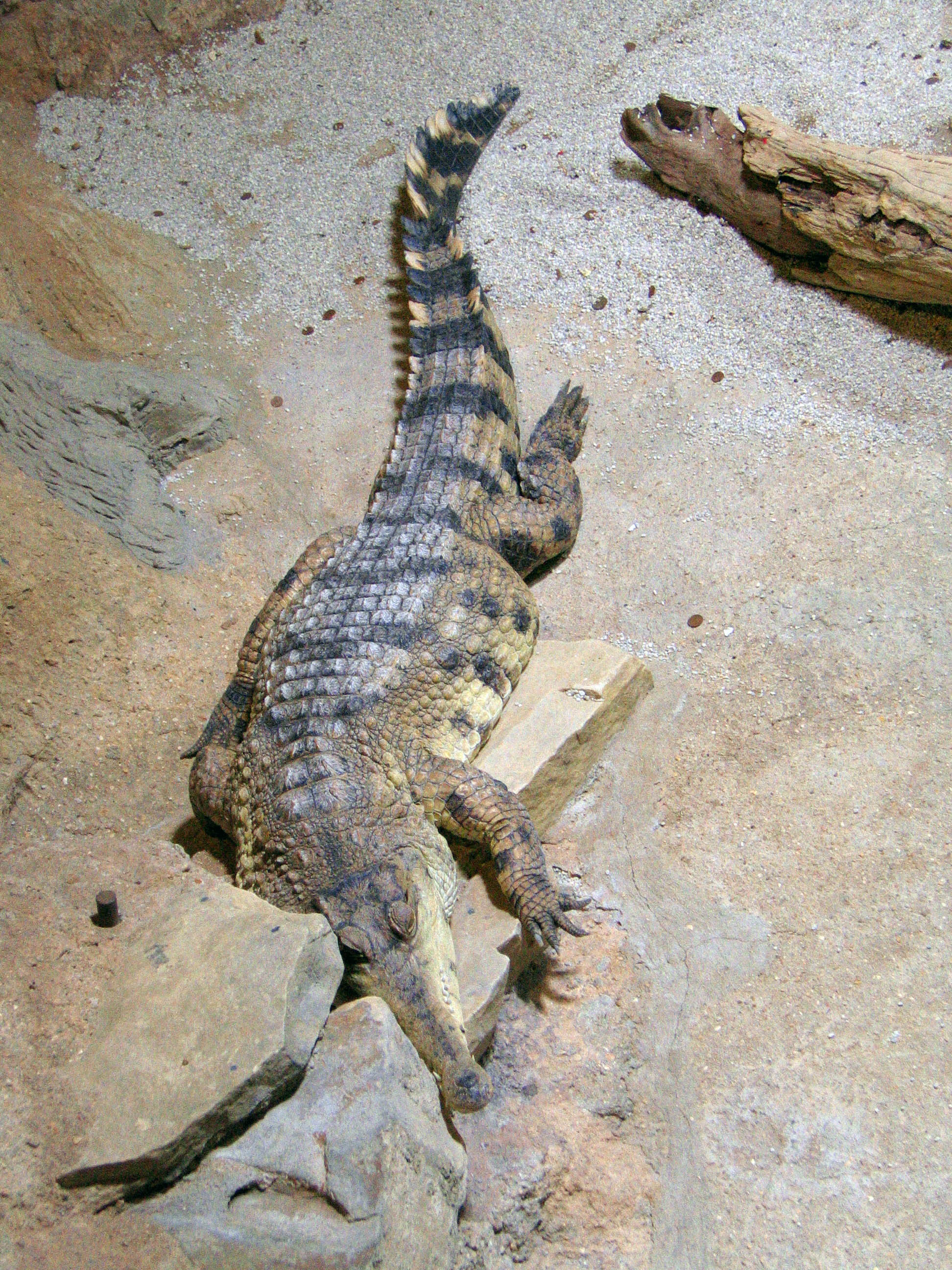 Crocodylus cataphractus faux-gavial d'Afrique aquarium de la porte Dorée Paris